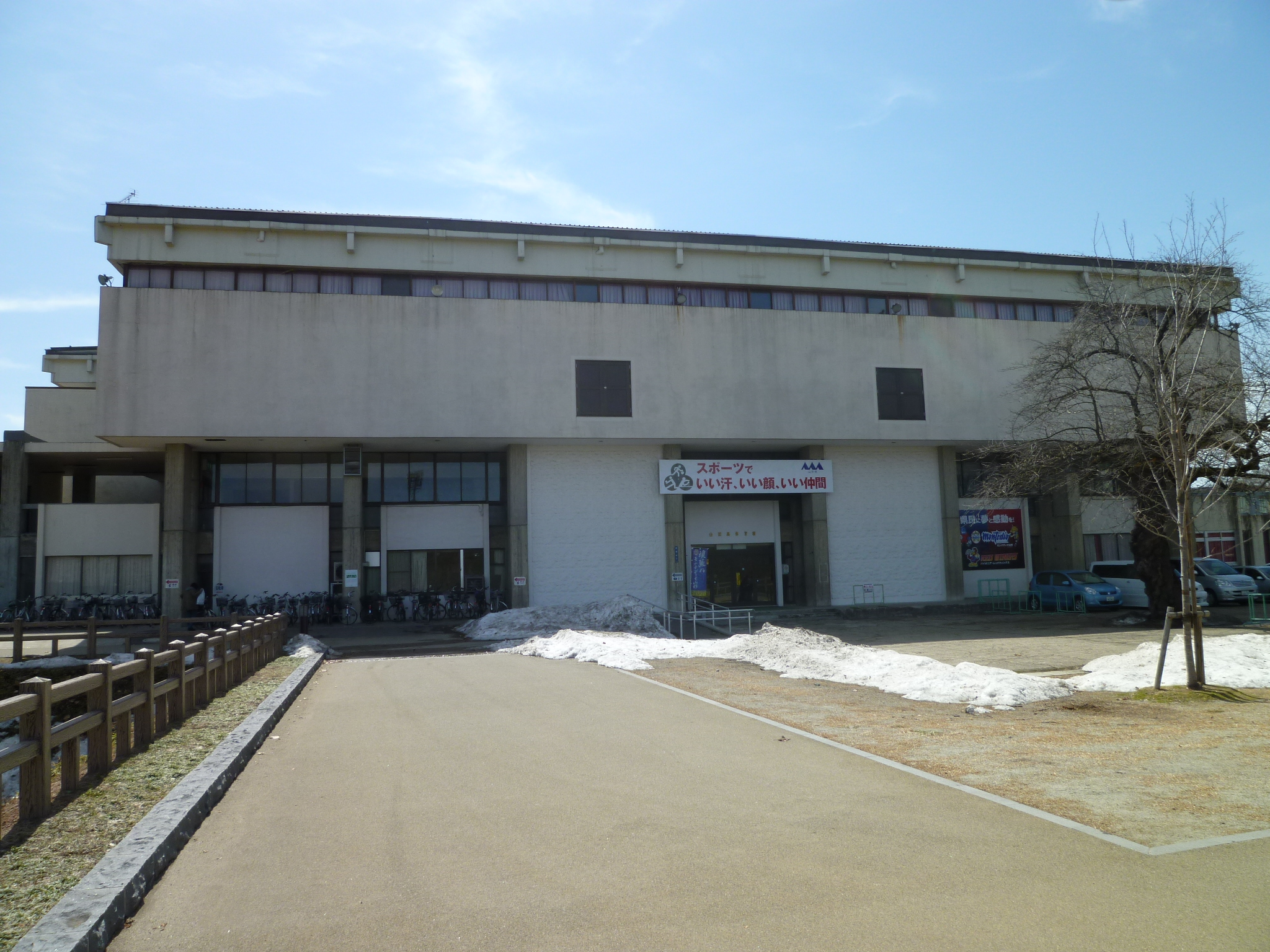 山形県体育館。 山形県山形市、霞城公園内に所在。